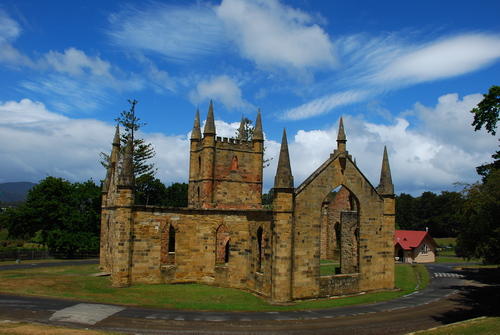 中文（中国大陆）: 塔斯马尼亚亚瑟港被焚毁的教堂